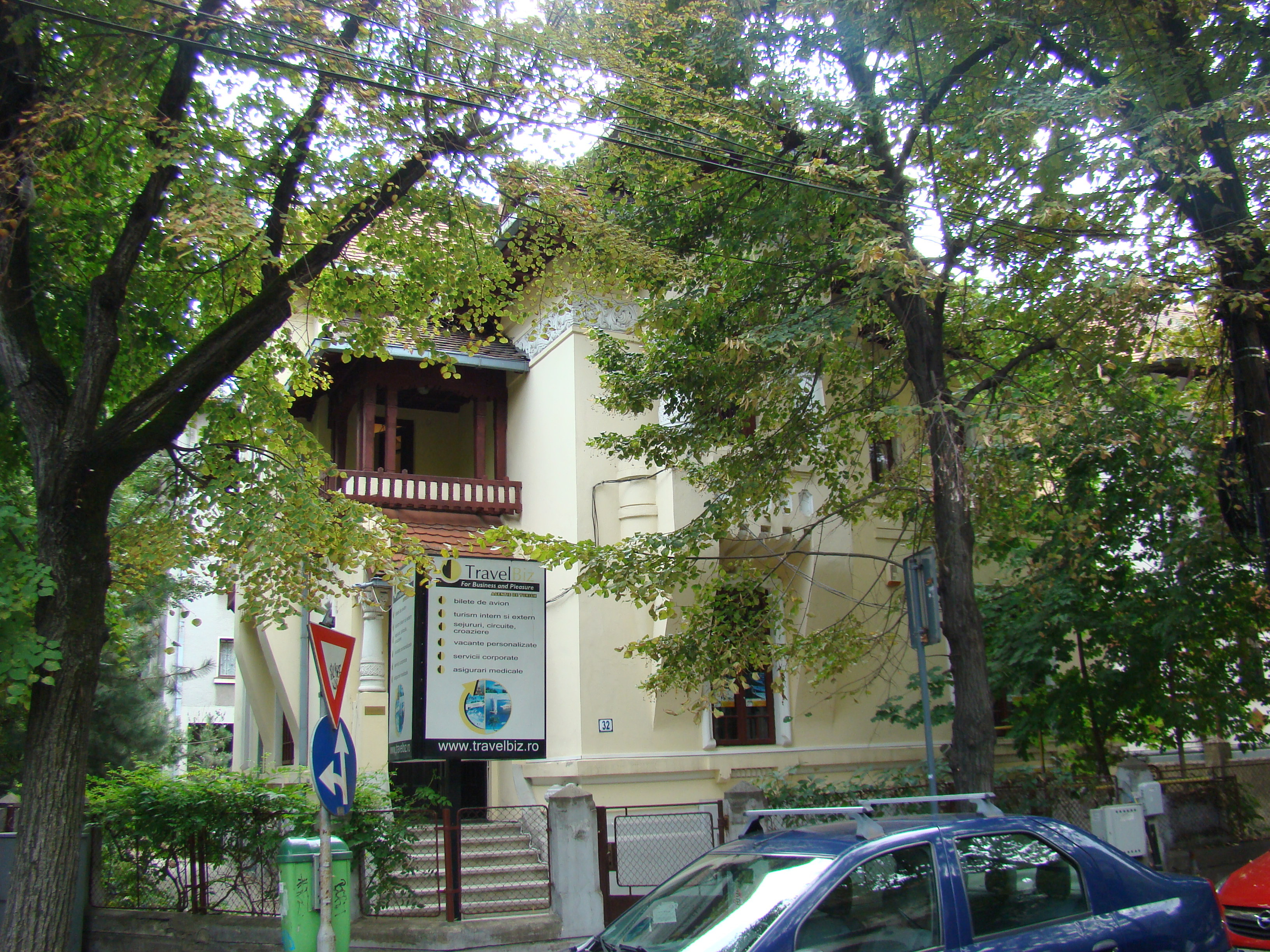 Casă monument istoric, str. Washington, nr.3